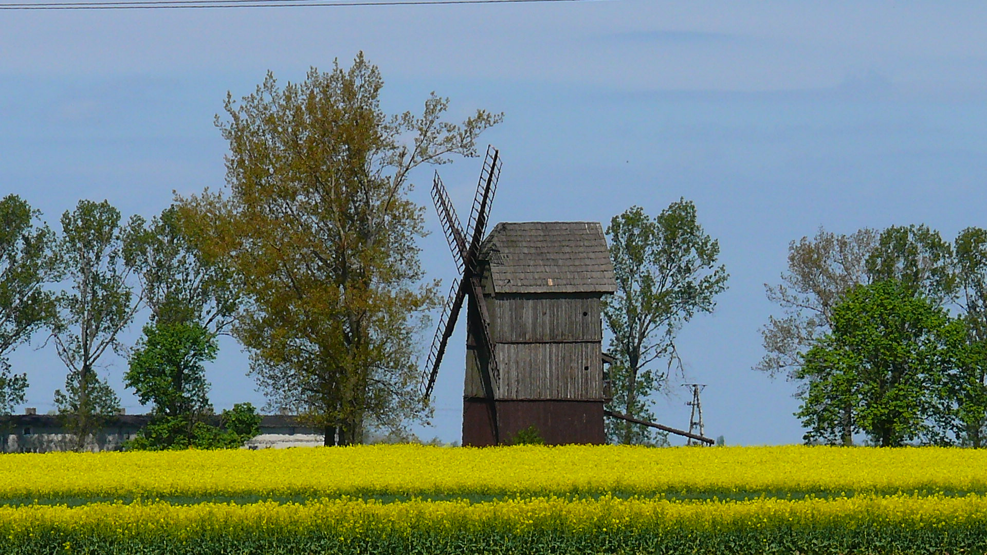 Wiatrak w Rybitwach (drugie ujęcie)